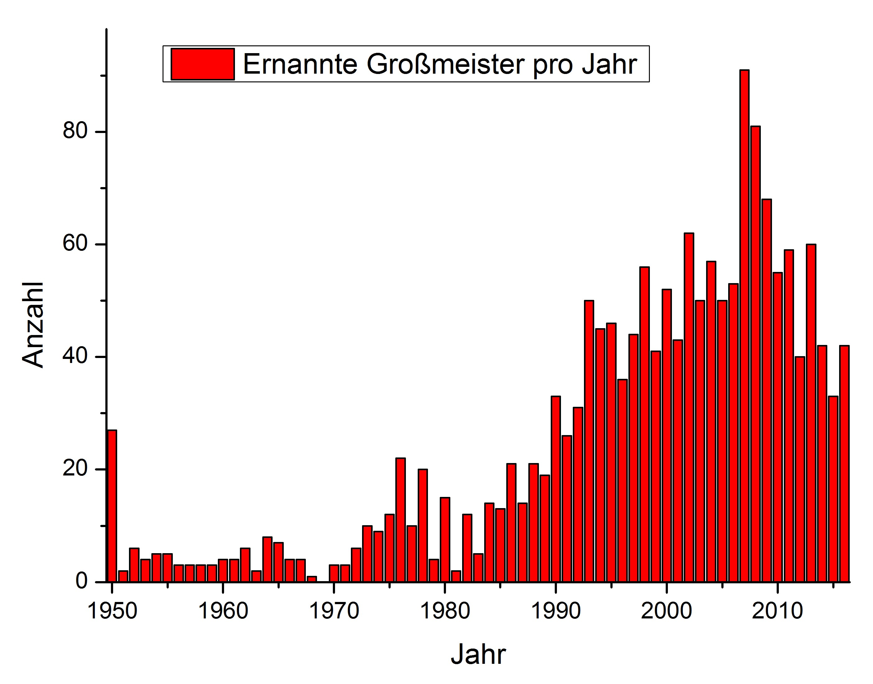 Neue ernannte Großmeister pro Jahr seit der Erstverleihung 1950. Stand: 31. Dezember 2016